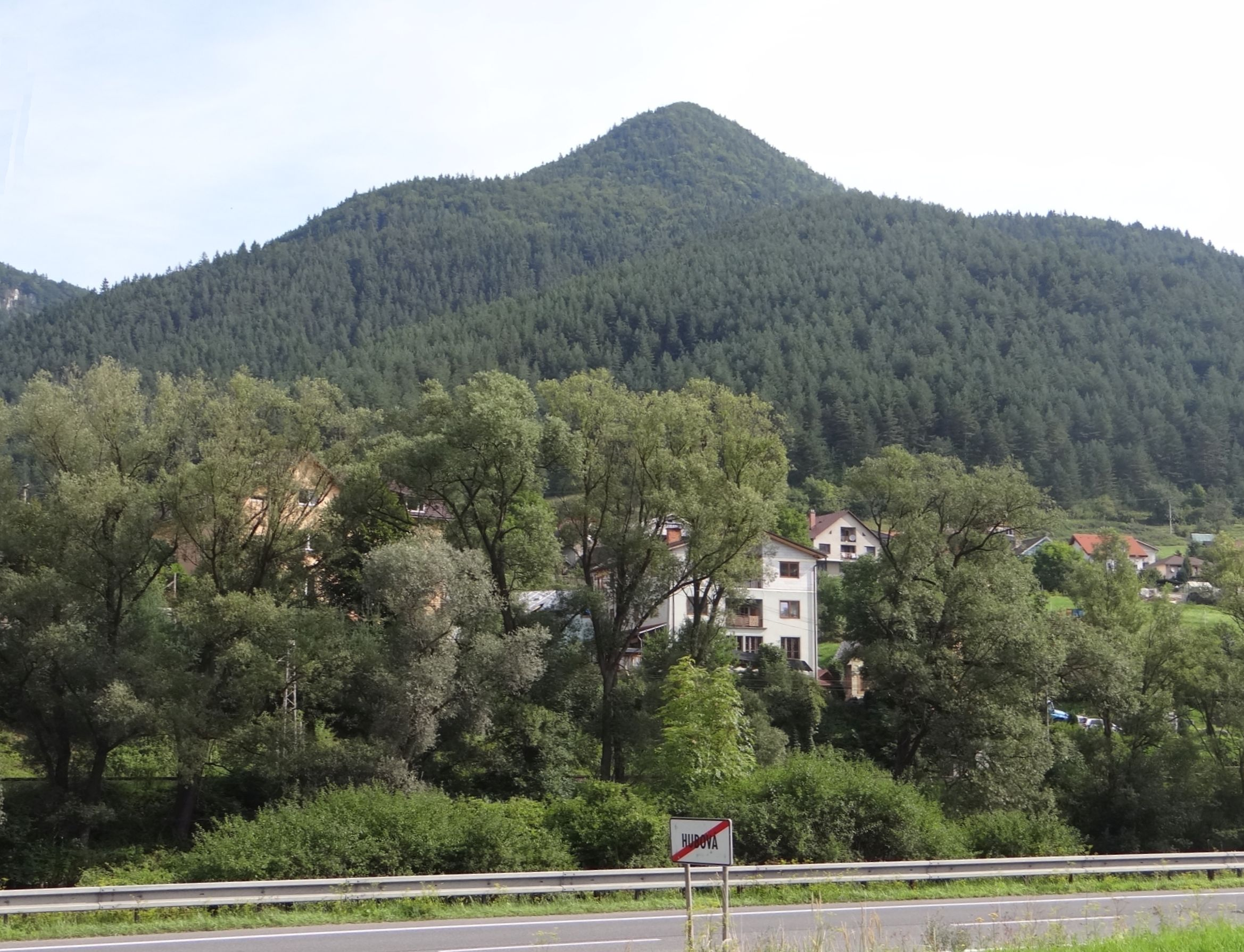 Kečky, widok z szosy po południowej stronie Wagu